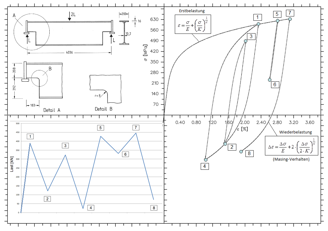 Hysteresen3